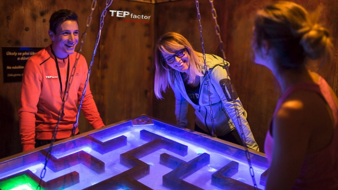 Spolupráce v týmu je postavená i na otevřenosti a na emocích. Může tedy být zvolena zábavná forma teambuildingu, kde je tým lidí otevřenější svým emocím a dokáže pak lépe pracovat s ostatními.